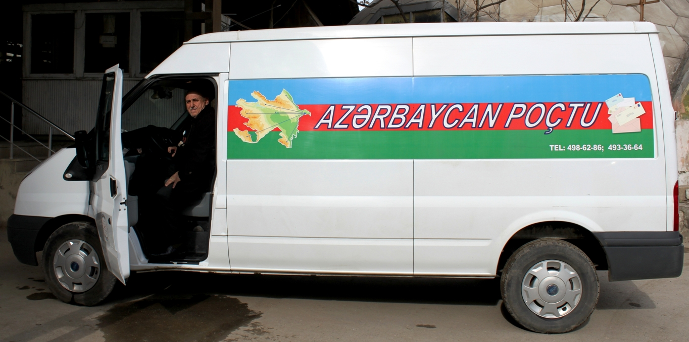 Почтовый автомобиль.